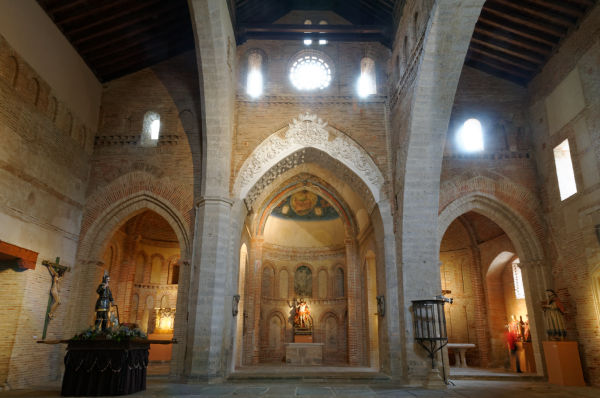 Iglesia del Santo Sepulcro de Toro.